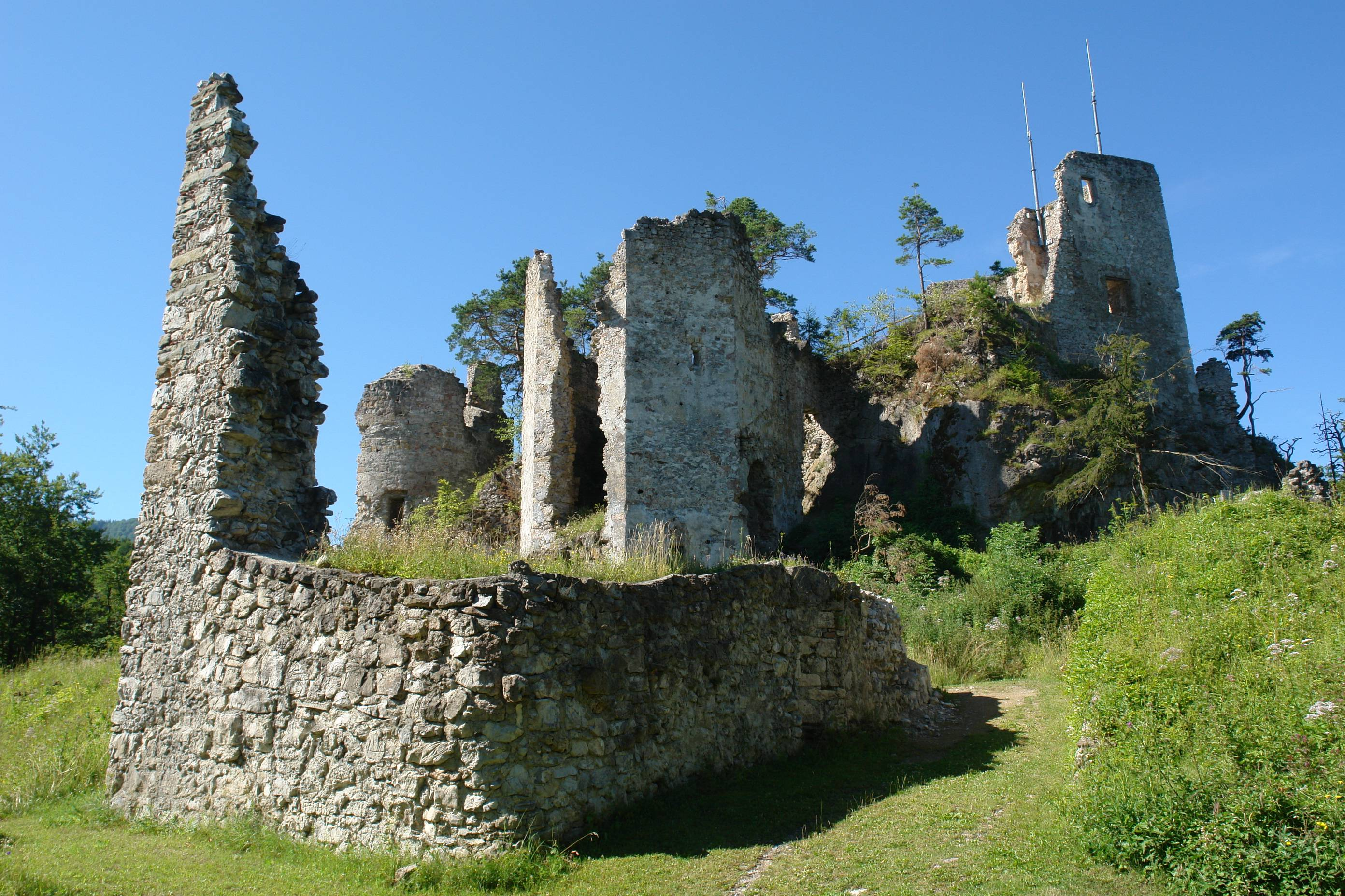 Burgruine Rabenstein an der Pielach 2007